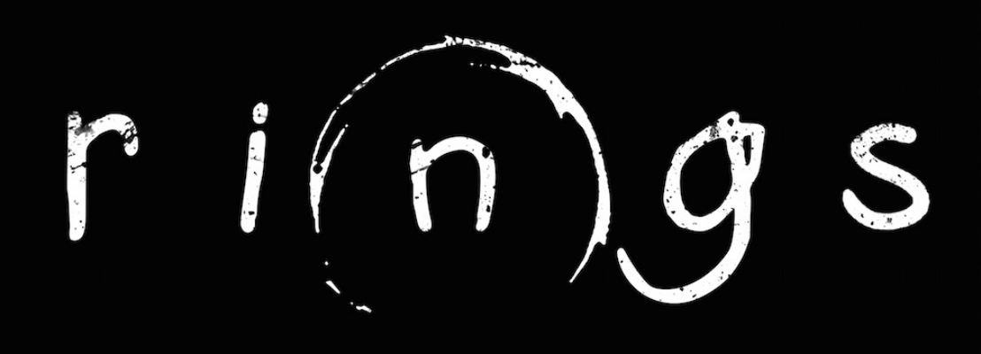 Logo de película Rings (2017).